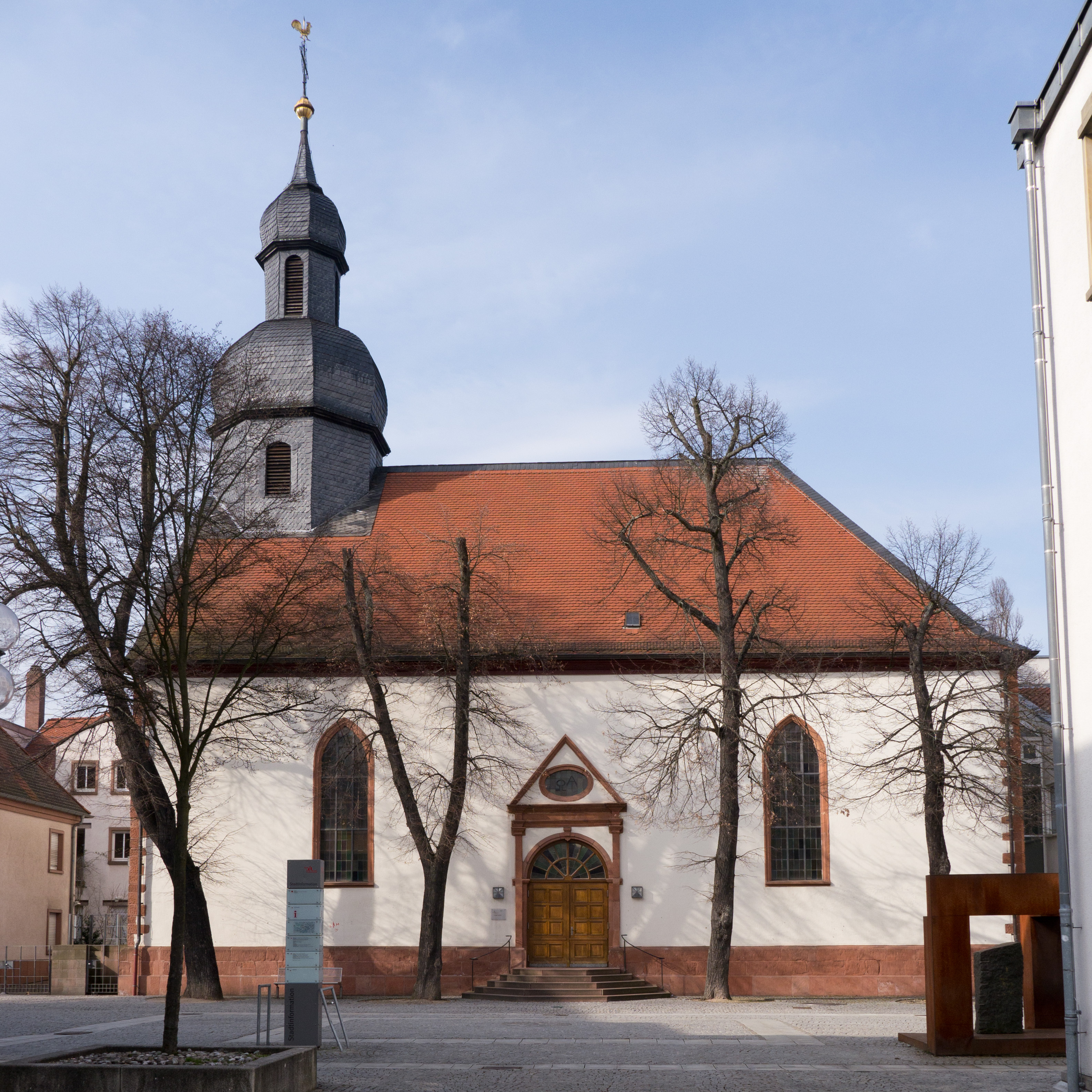 Außenansicht der kleinen Kirche in Kaiserslautern